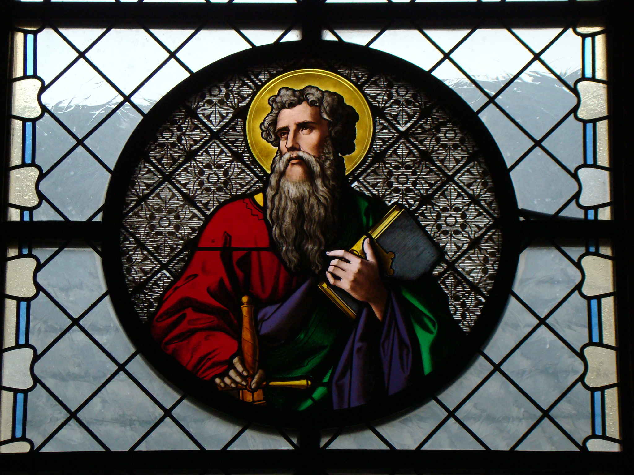 Katholische Kirche St. Michael in Wiesenbach / Baden, Fenster im Ostchor